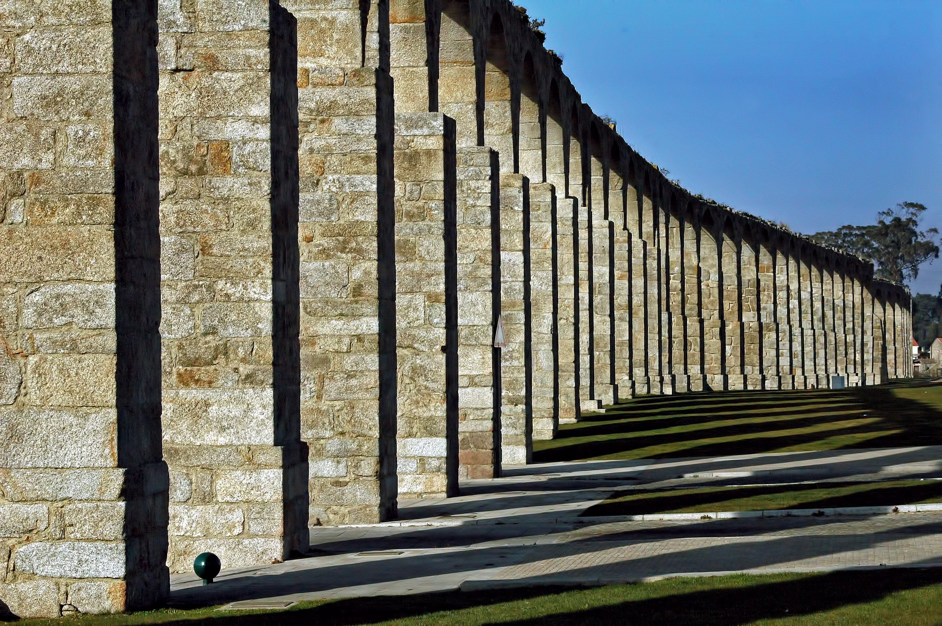 Vila do Conde-Aqueduto de Santa Clara This file was uploaded for Wiki Loves Monuments in Portugal with the unique identifier 71209.